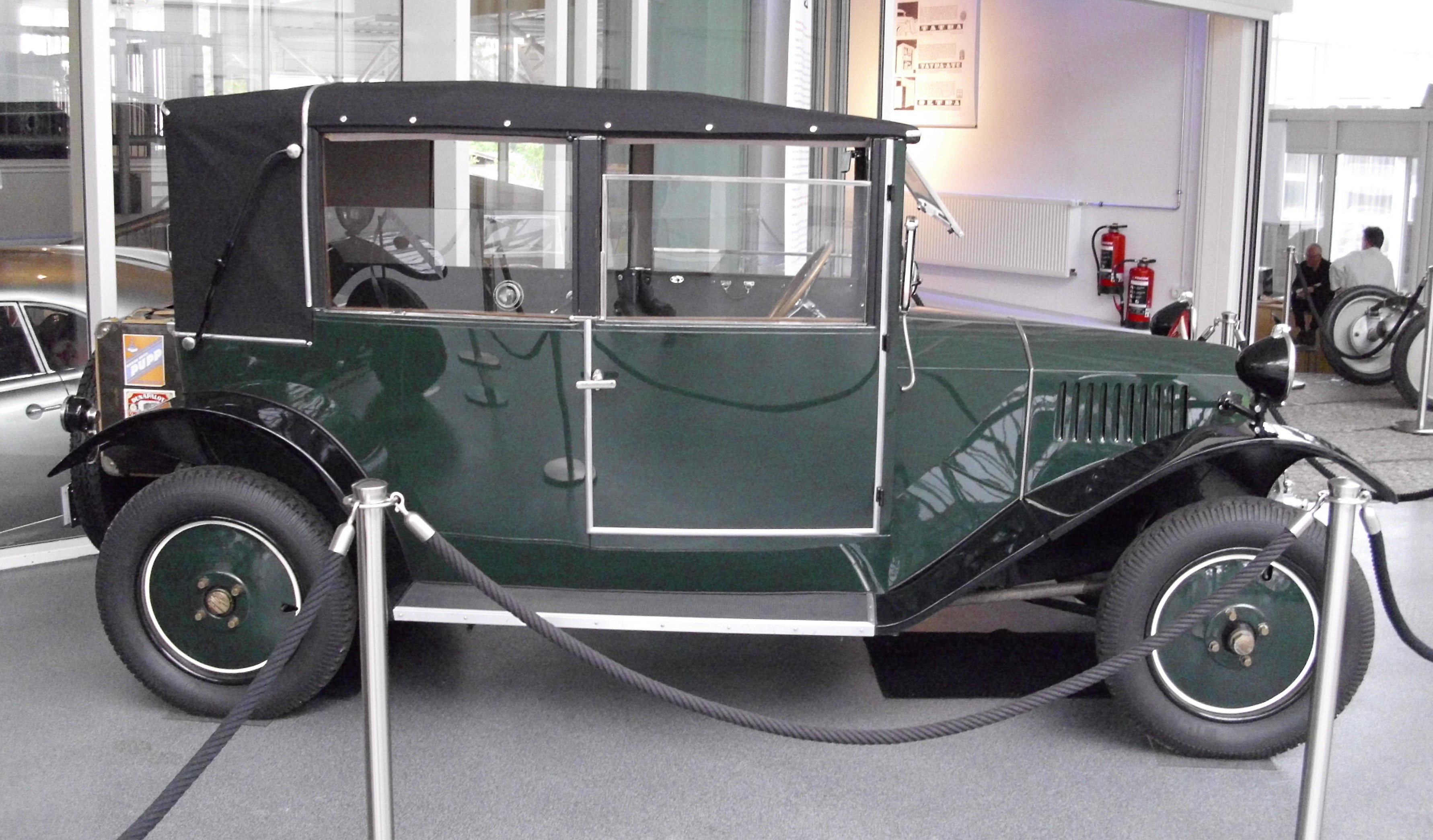 Tatra 11 von 1927, hergestellt durch die Deutsche Licenz Tatra